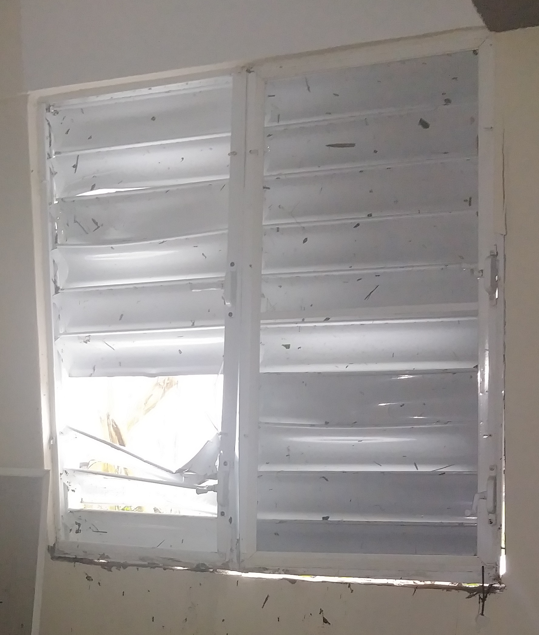 Ventanas rotas con el Huracan María en Aguas Buenas.